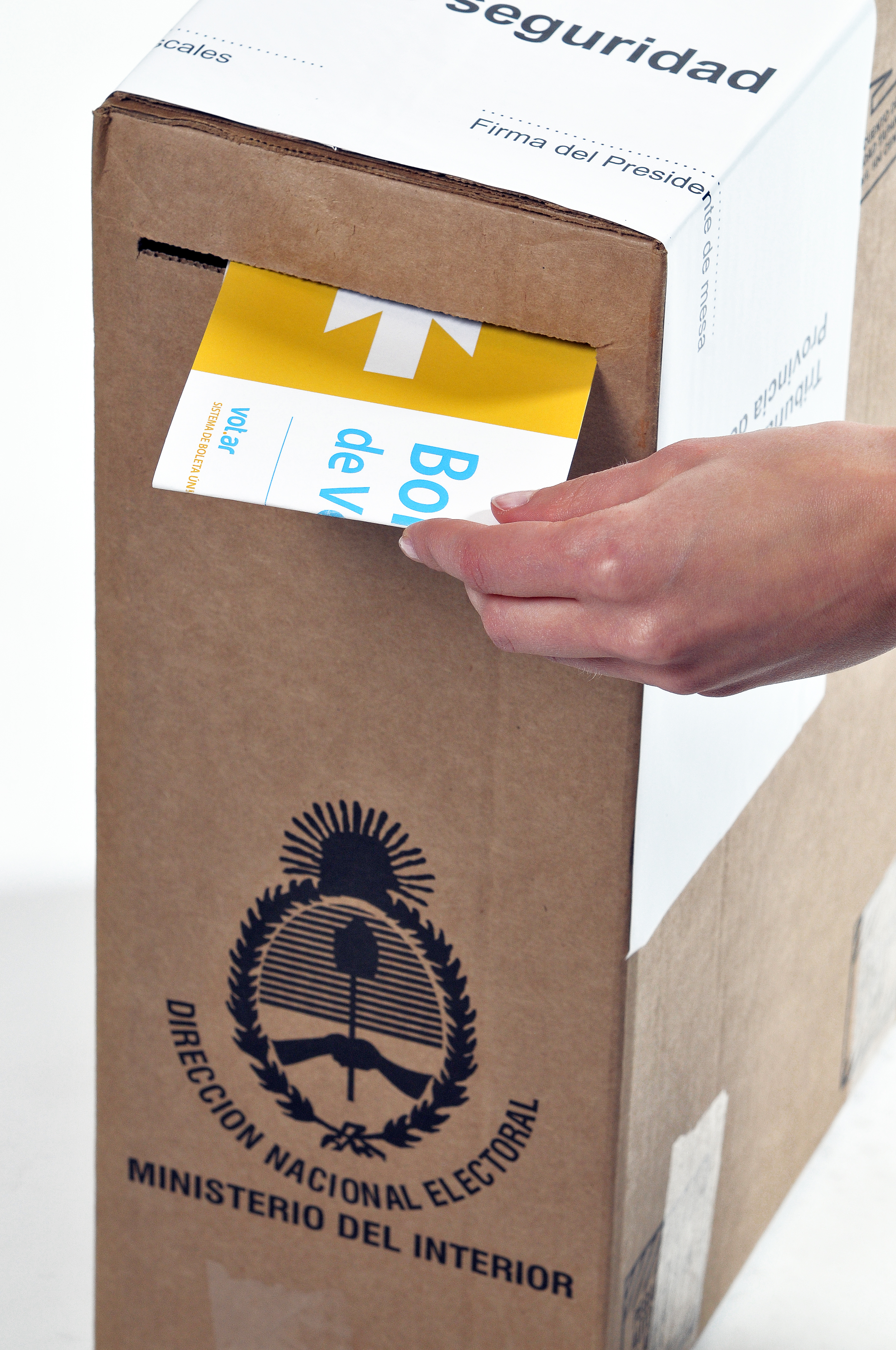 La Boleta Única Electrónica será ingresada a la urna